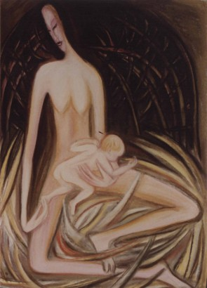 Dílo Miluše Poupětové